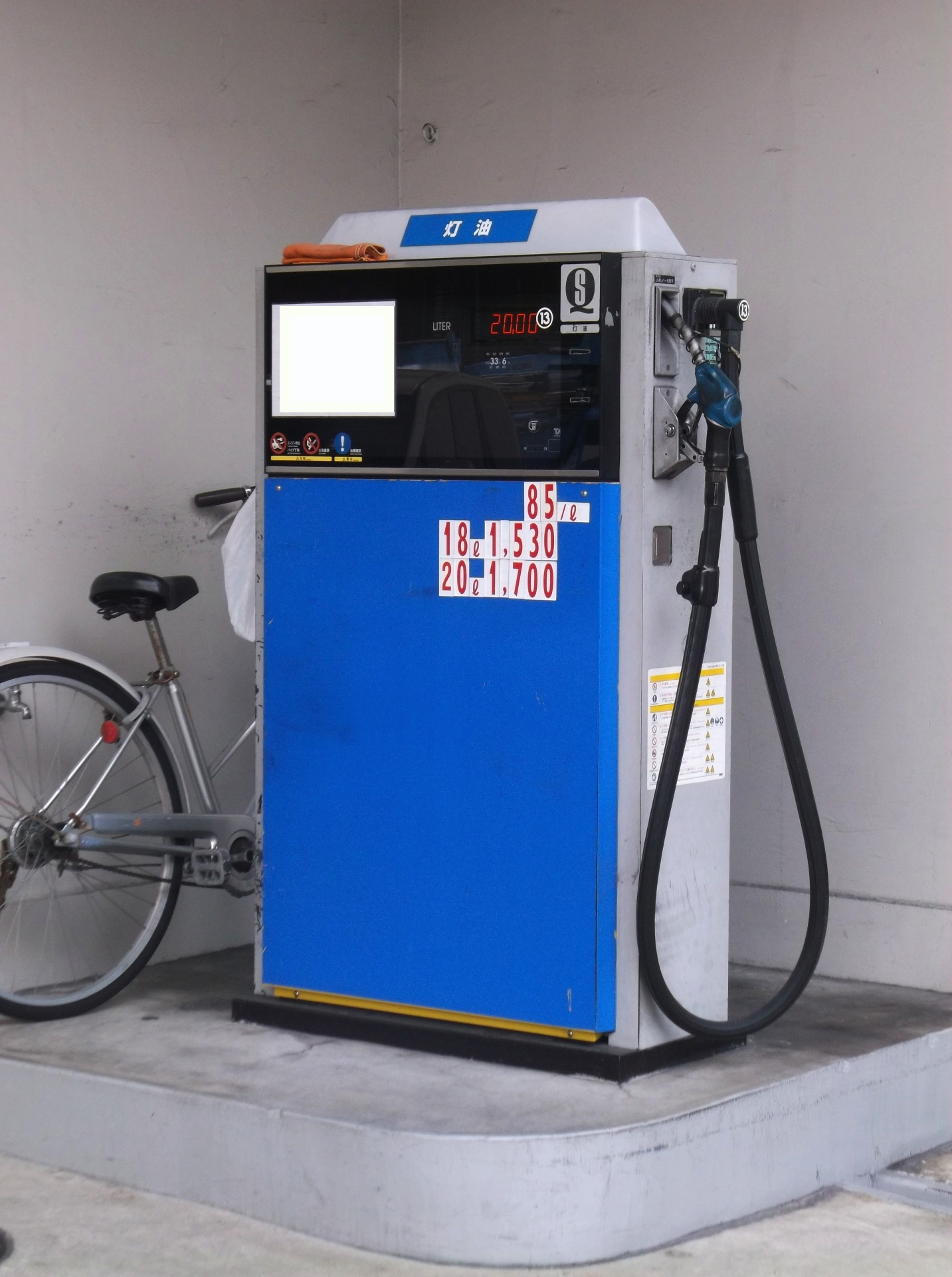 灯油専用の給油機。日本では、画像のように灯油の給油機は他の燃料の給油機とは別の場所に置かれている場合が多い。